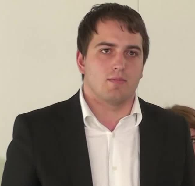 Andrej Čuš